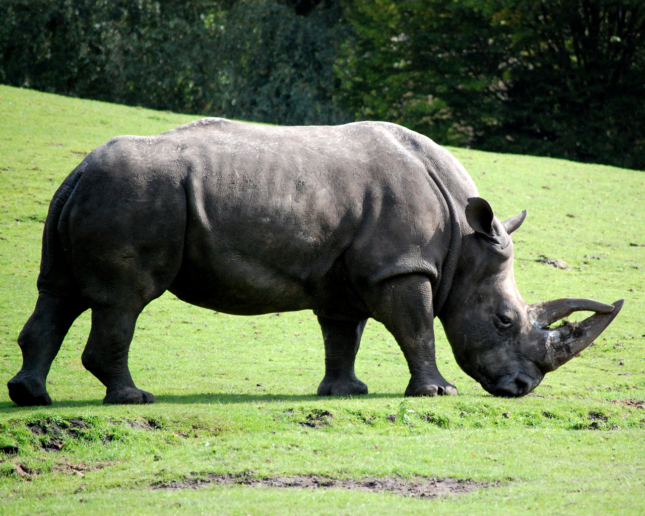 Neushoorn - Dierenpark Emmen